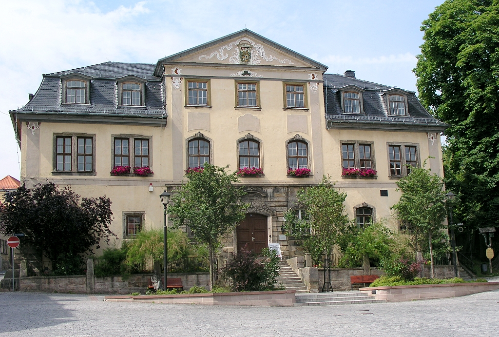 Das Bild zeigt das im Jahr 1616 erbaute barocke Amtshaus in Ilmenau. Das jetzige Aussehen gab ihm der Thüringer Barockbaumeister G. H. Krohne in den Jahren 1753 - 1756.